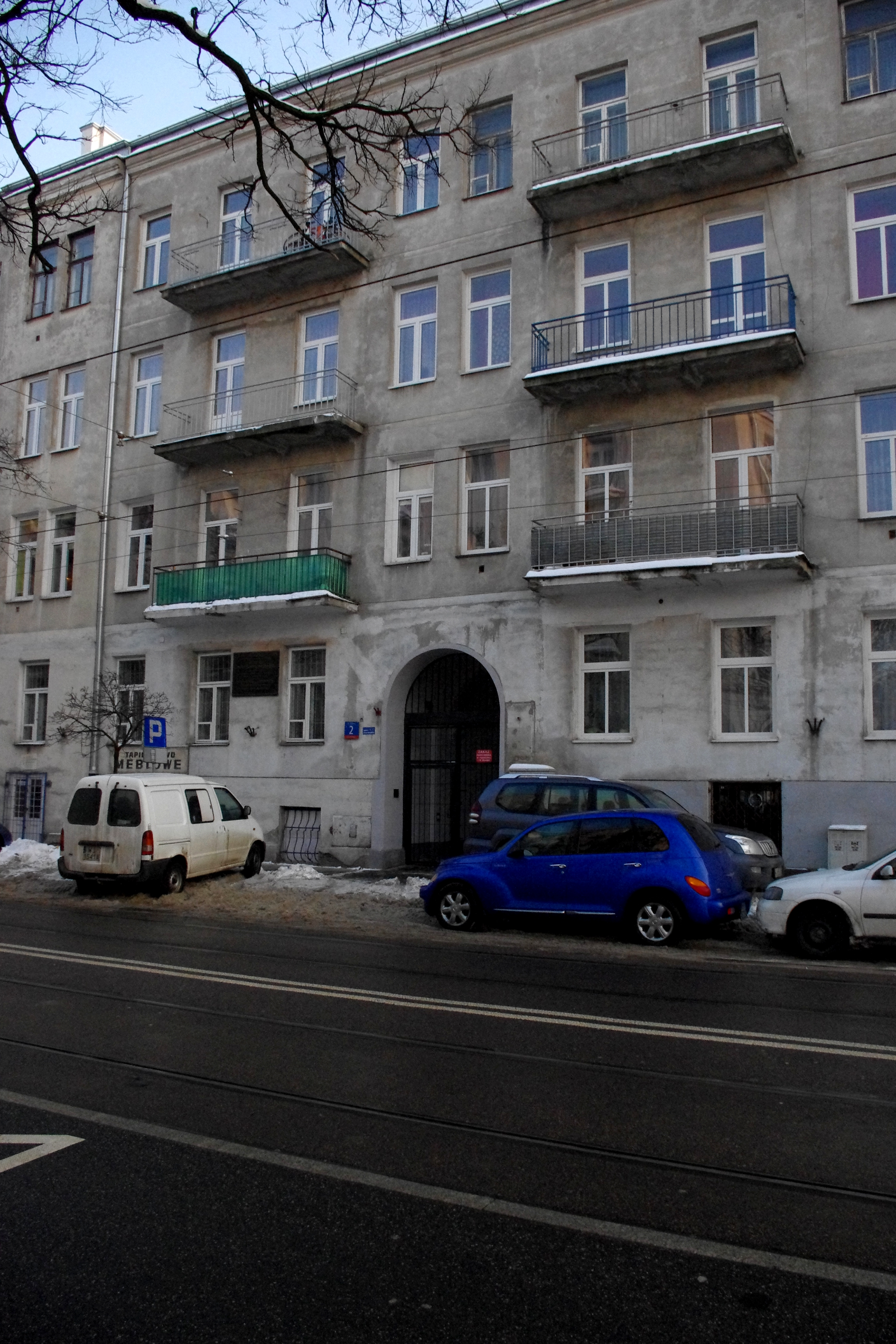 Kamienica przy ul Stalowej 2 na warszawskiej Pradze, gdzie w latach 1924-1928 mieszkał działacz komunistyczny i jeden z liderów KPP – Jerzy Czeszejko-Sochacki